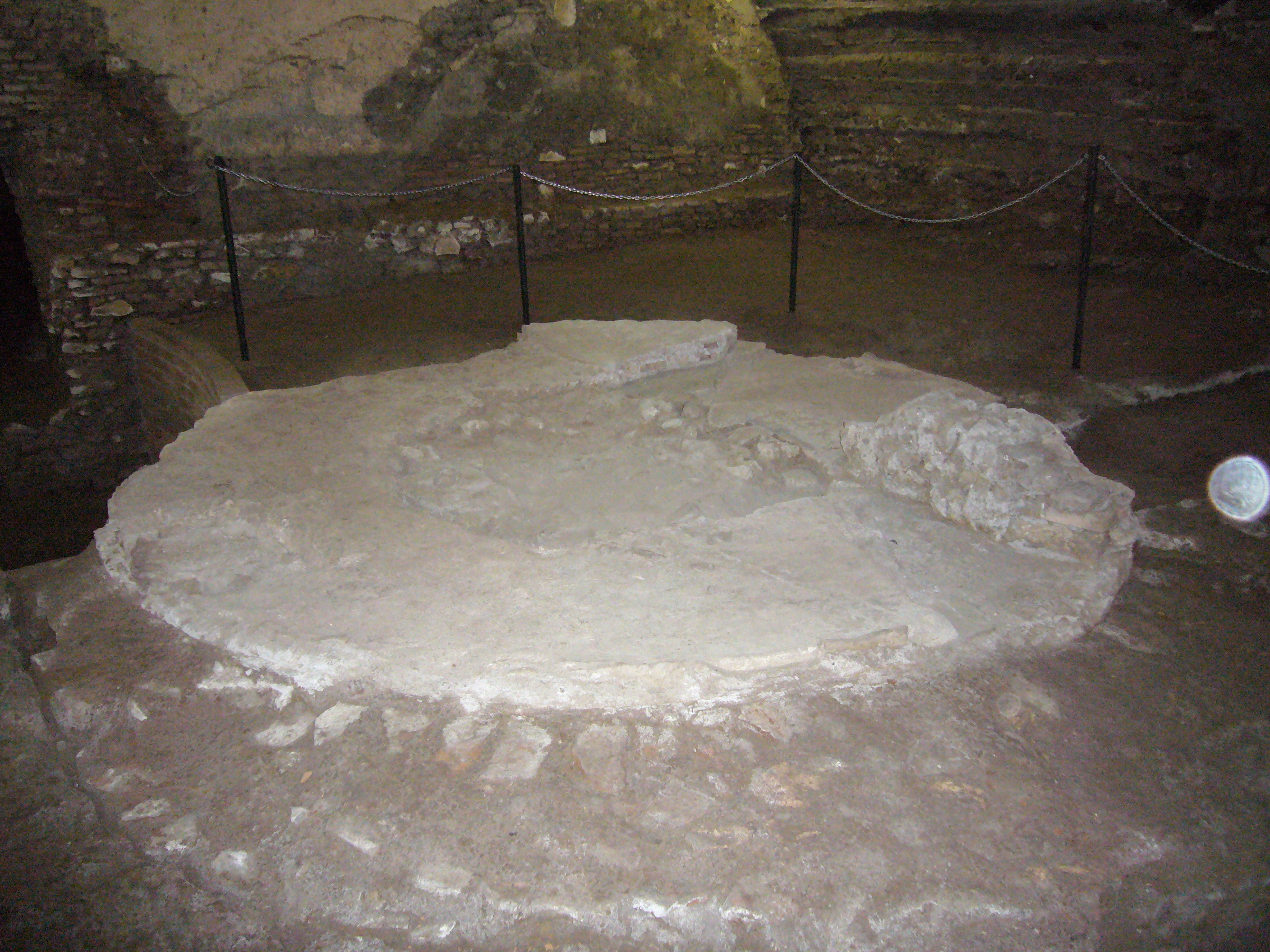 Roma, san Lorenzo in Lucina, scavi sotto la sala dei canonici: resti del battistero paleocristiano con la vasca rotonda